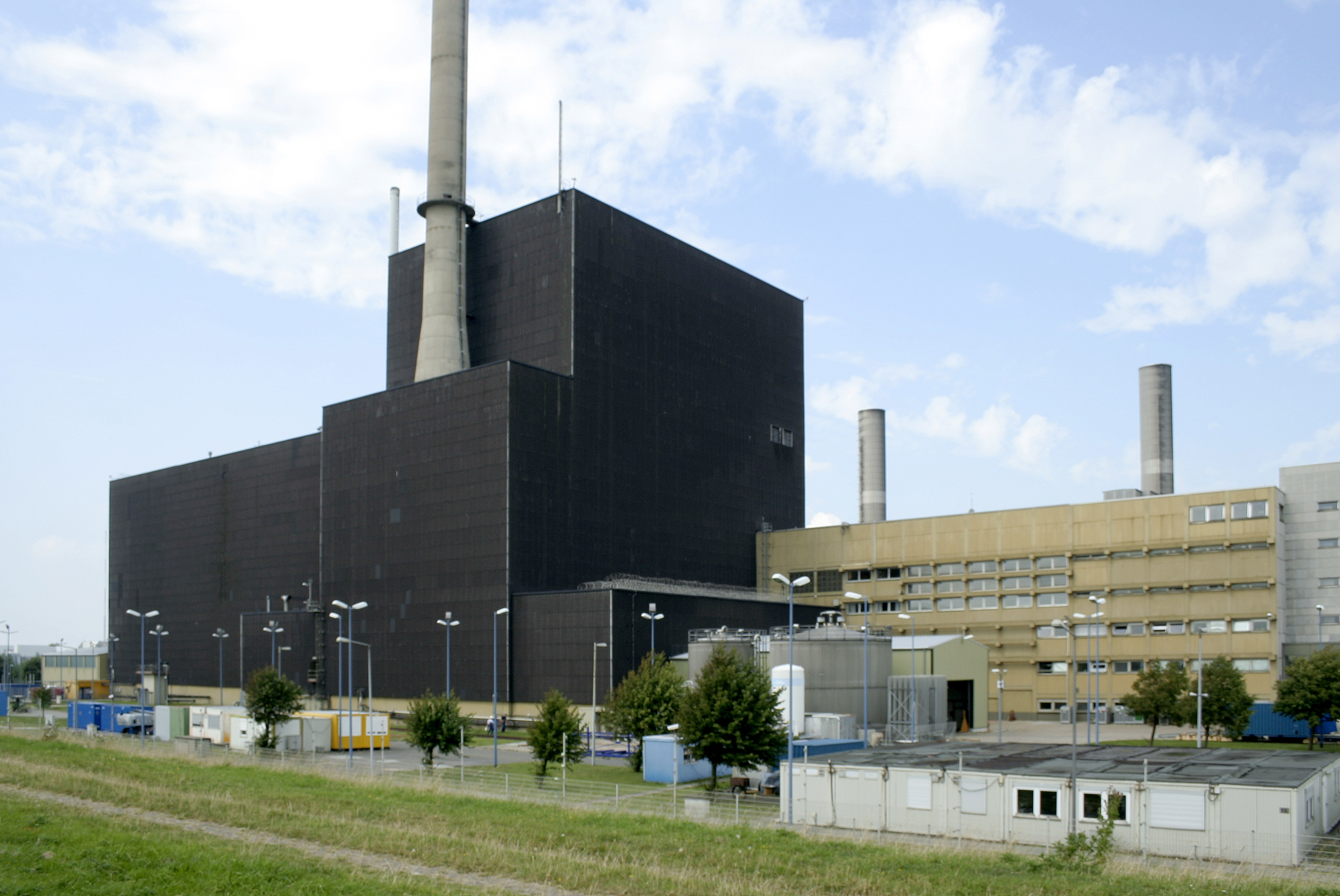 Kernkraftwerk Brunsbüttel, Aufnahmestandort: Deich